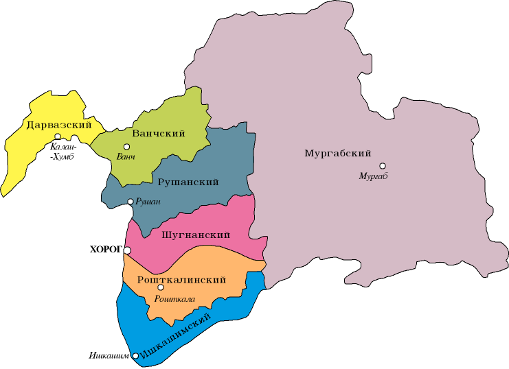 АТД ГБАО, Таджикистан